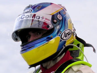 Björn Wirdheim wearing an Arai helmet